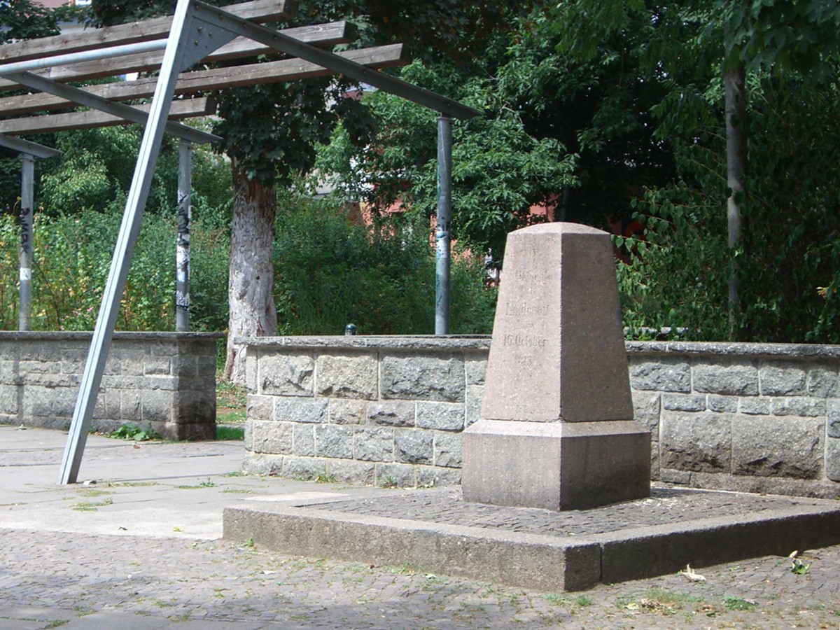 Apelstein Nr. 23 - Zur Erinnerung an die Völkerschlacht bei Leipzig Standort: Lindenau, Karl-Heine-Straße, 150 m westlich vom Felsenkeller